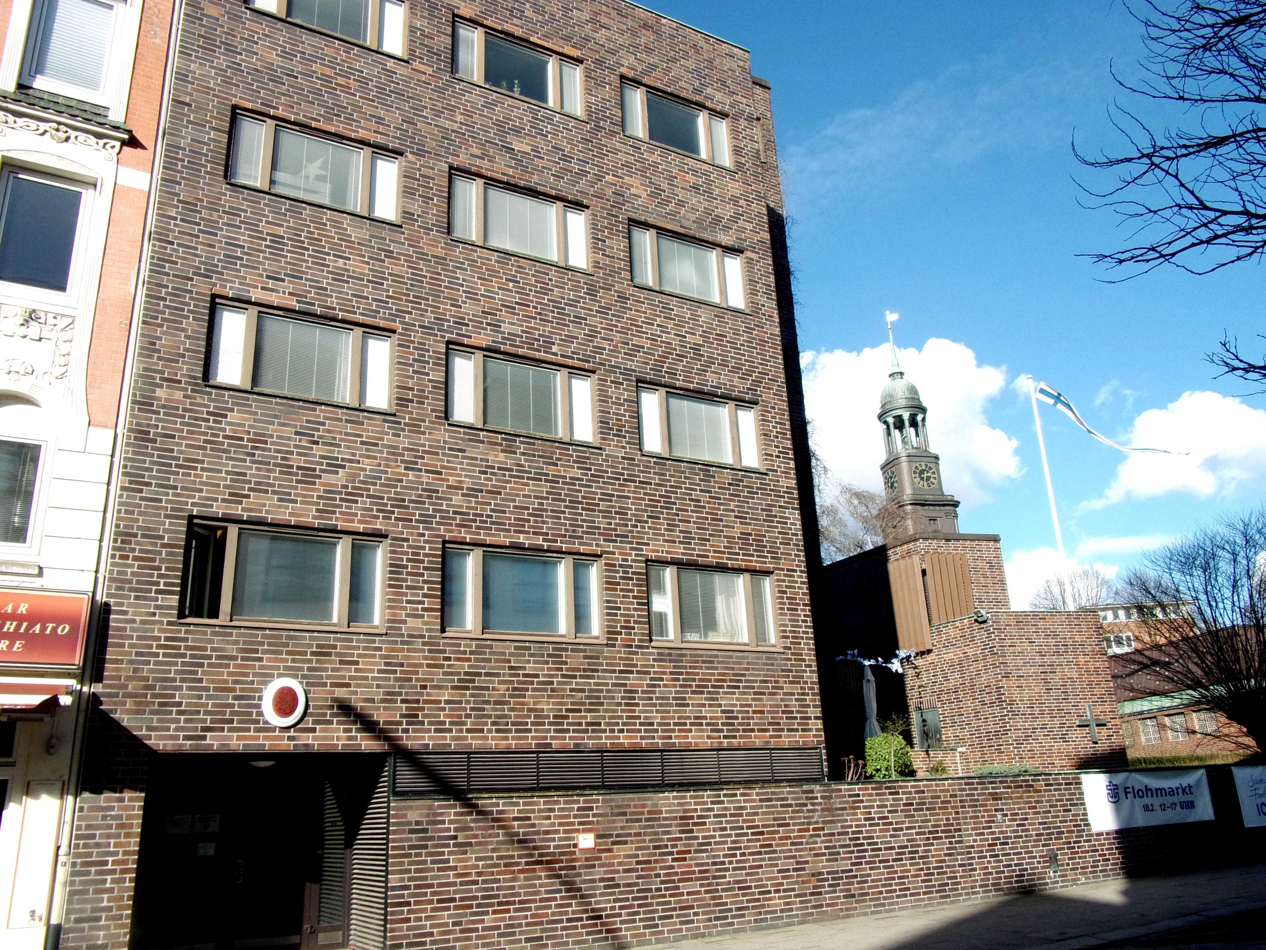 Finnische Seemanns-Mission und Honorarkonsulat, Ditmar-Koel-Straße 6, Hamburg-Neustadt-Süd, 1965/6, Entwurf P. Aloha in Zusammenarbeit mit Dieter Langmaack This is a photograph of an architectural monument.